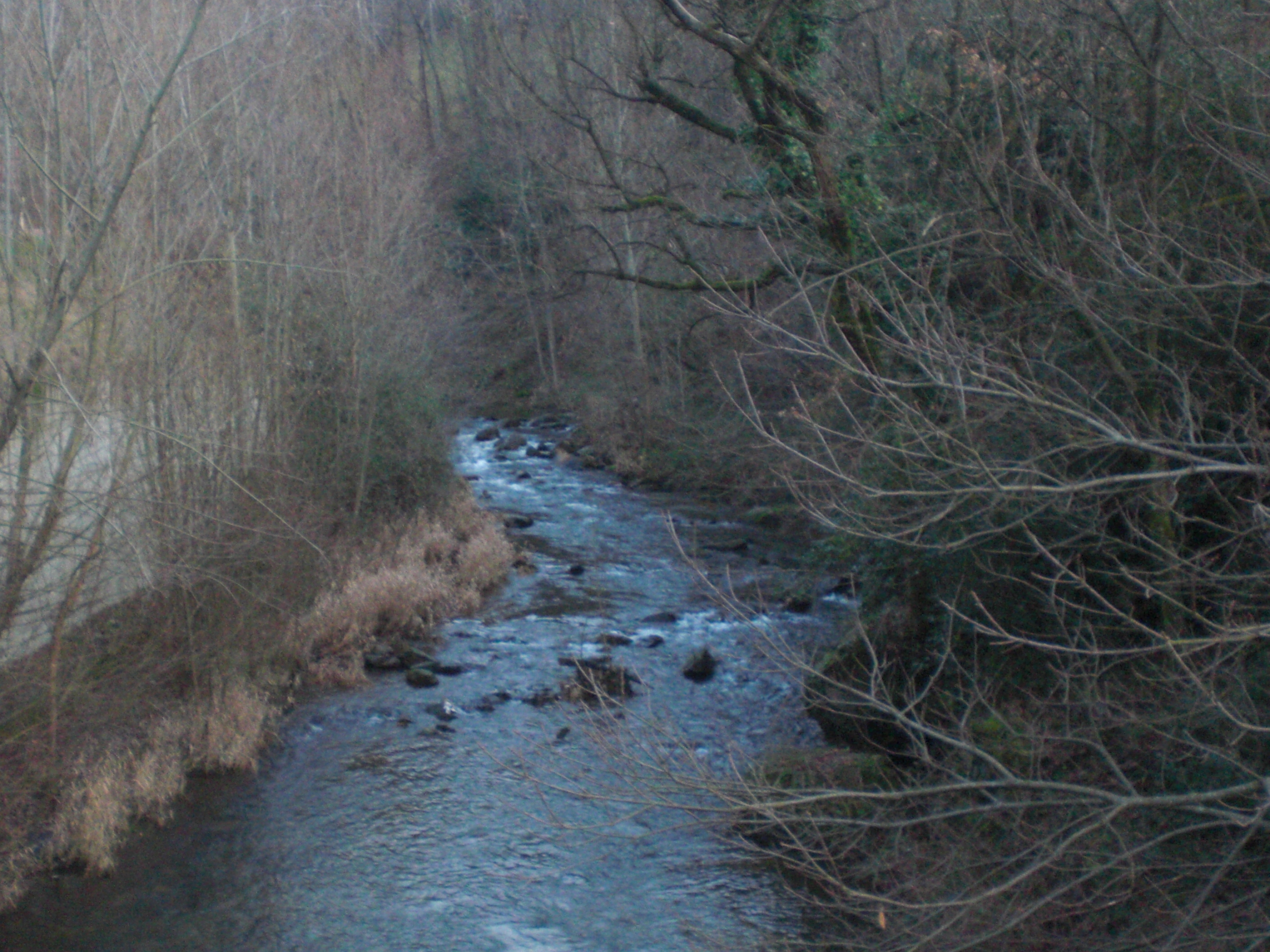 L'Arnette à hauteur de Hautpoul (commune de Mazamet)